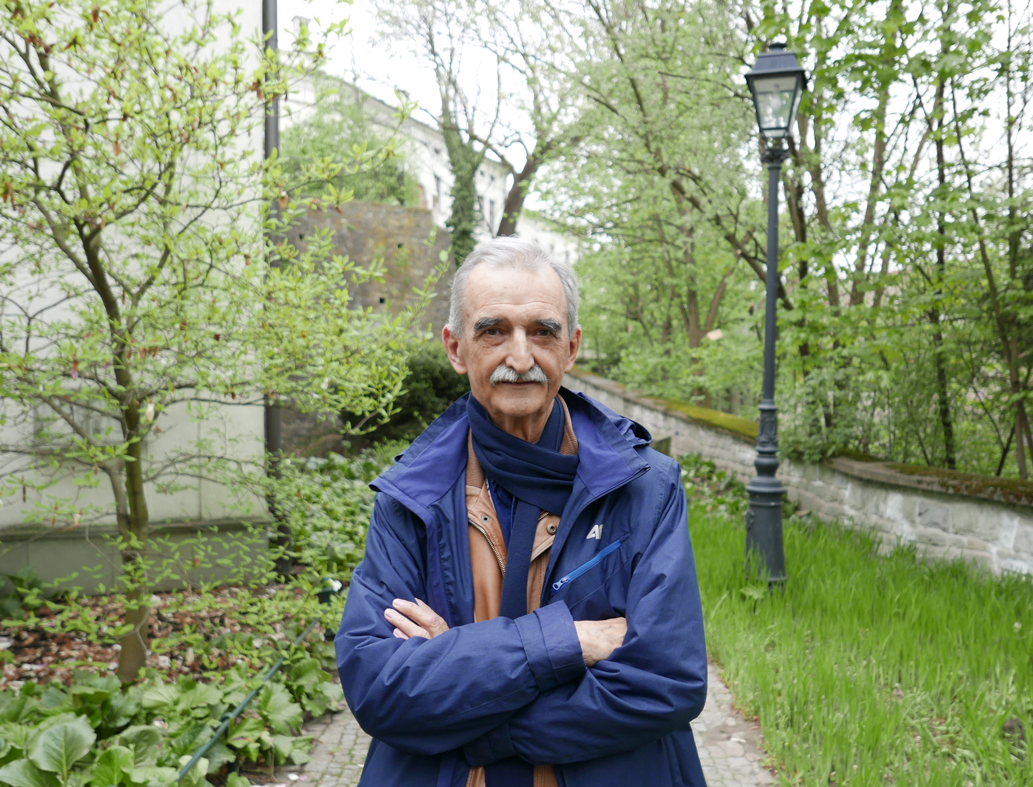 Marek Koterski (ur. 1942) – polski reżyser filmowy i teatralny, scenarzysta, aktor, poeta, prozaik i dramatopisarz. Na festiwalu filmowym Kino na Granicy w Cieszynie 2019